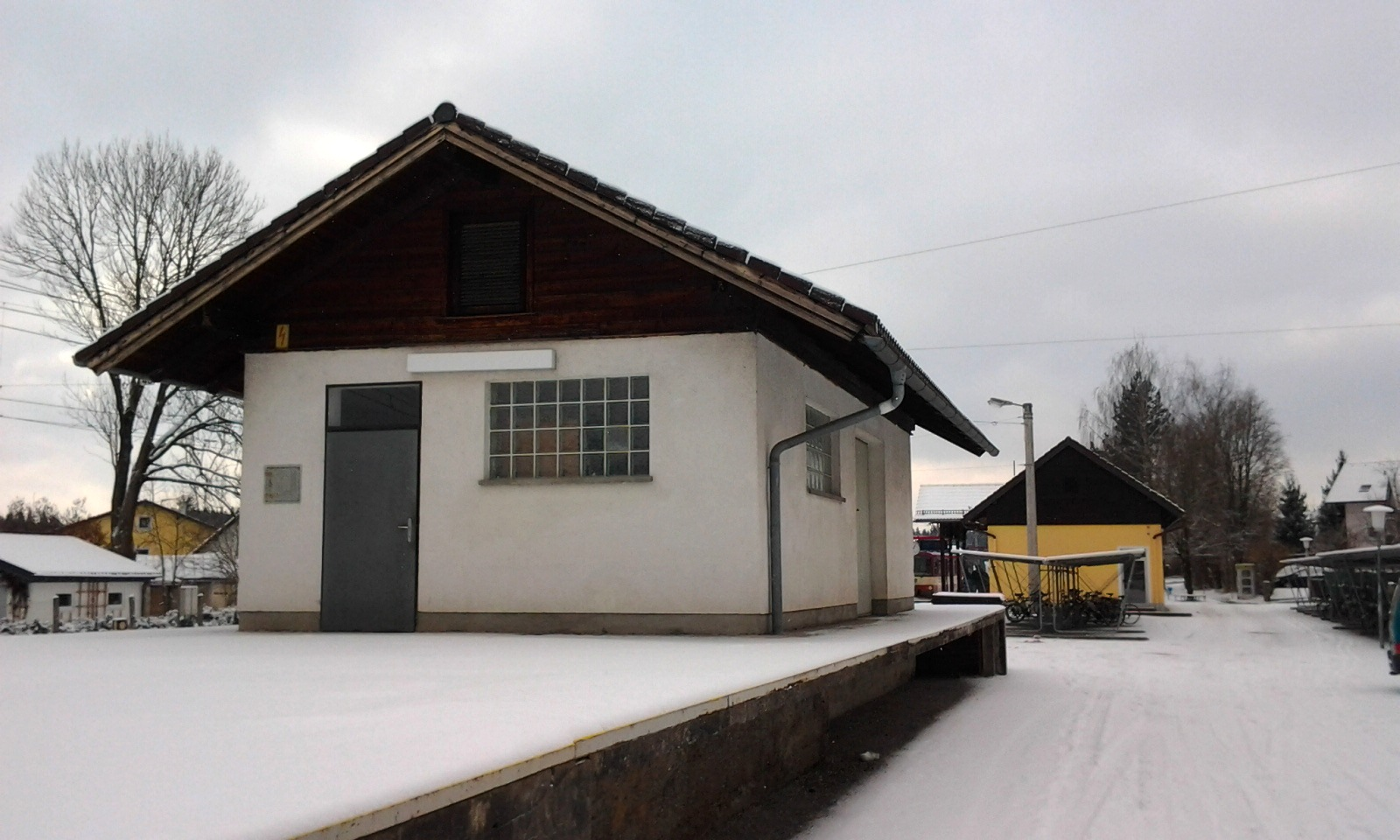 Lagerhaus des Bahnhofs Bürmoos im Winter, abgerissen im Sommer 2016.